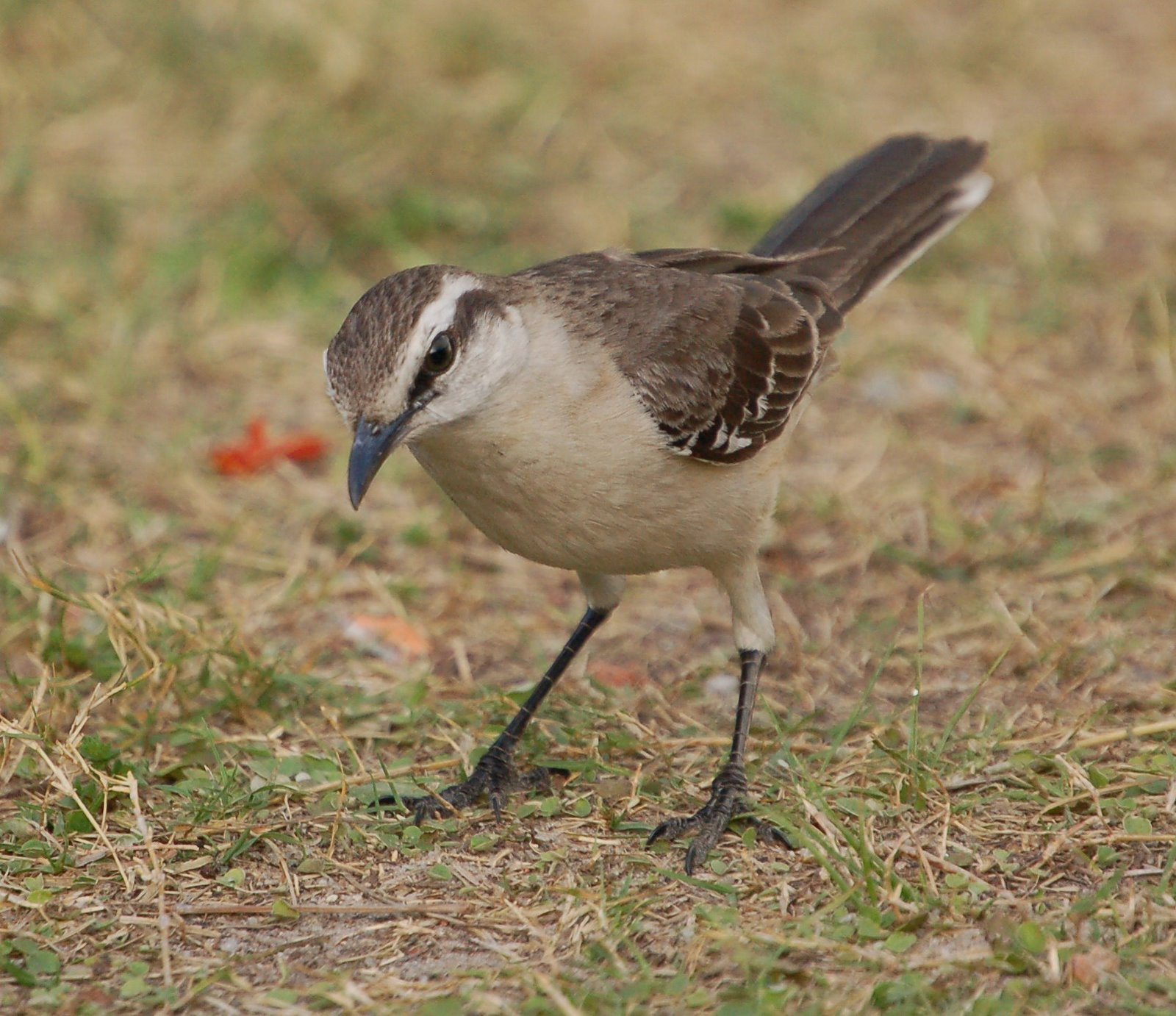 CALANDRIA Mimus saturninus